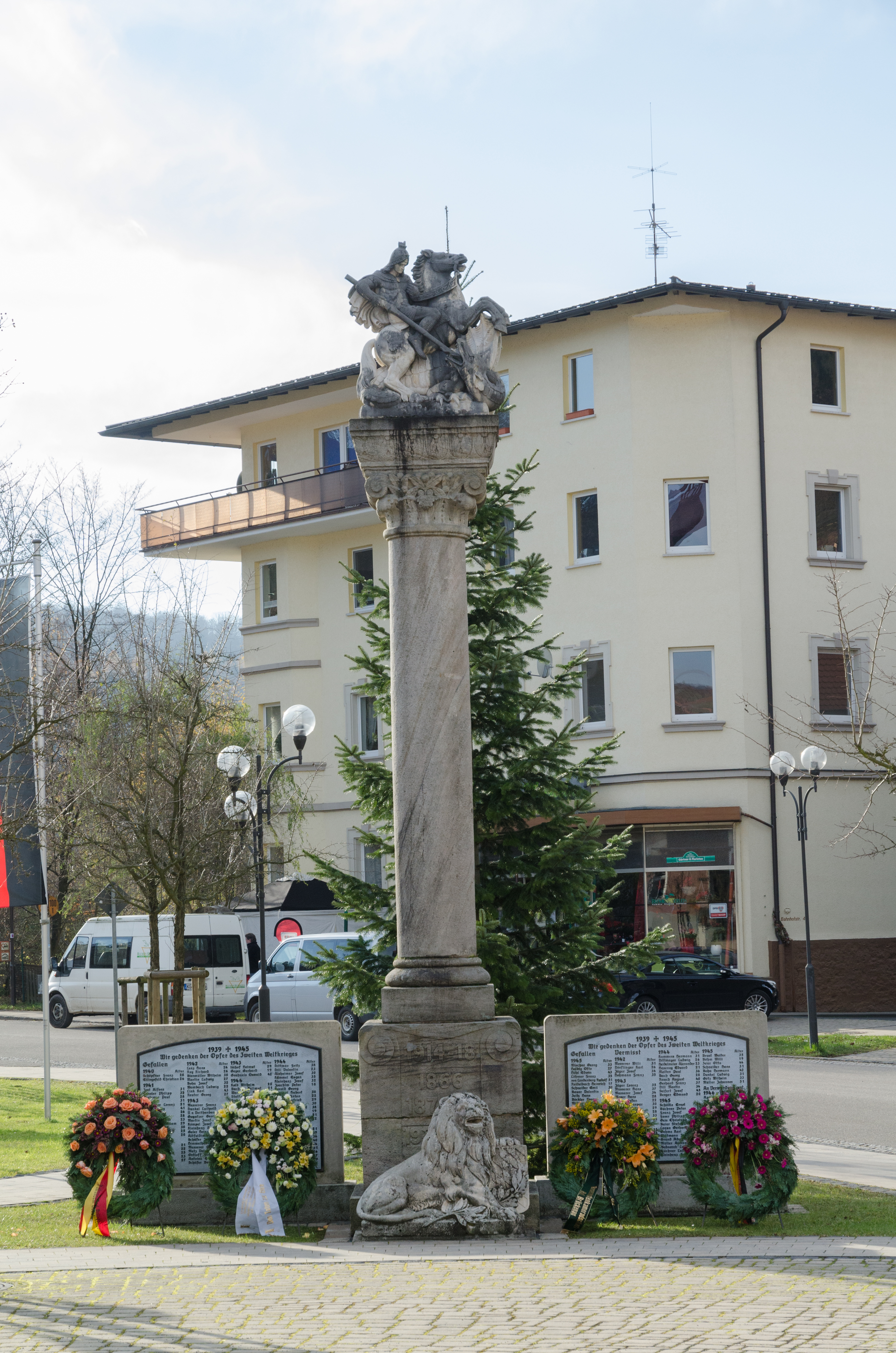 Bad Brückenau, Alter Rathausplatz